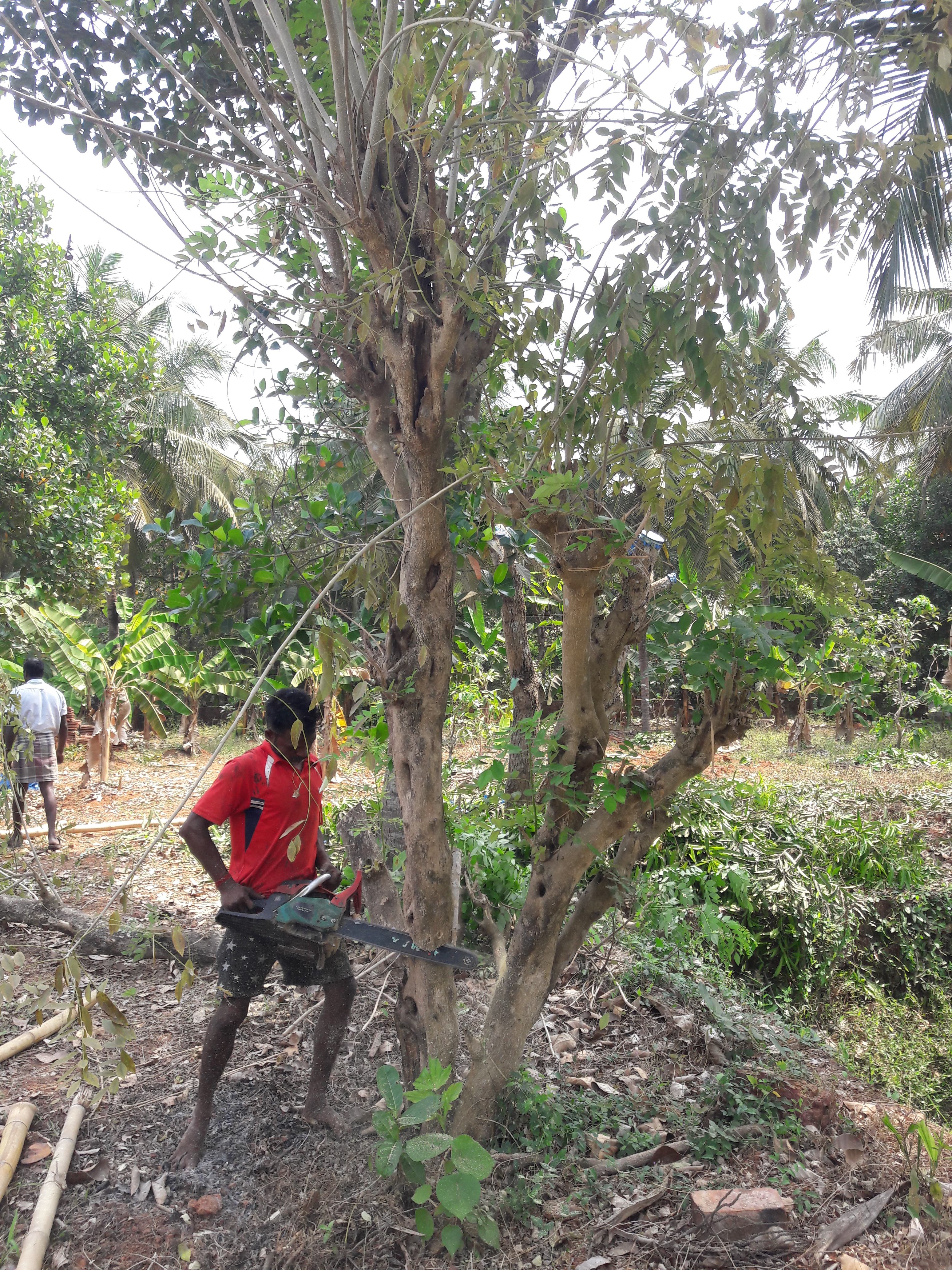 മരങ്ങളിലെ പുനര്‍ യൗവന പ്രക്രിയ വഴി ശീമക്കൊന്നയെ വെട്ടി ചെറുപ്പമാക്കുന്നു.Gliricidia tree ശാസ്ത്രീയ നാമം Gliricidia sepium കുടുംബം Fabaceae.